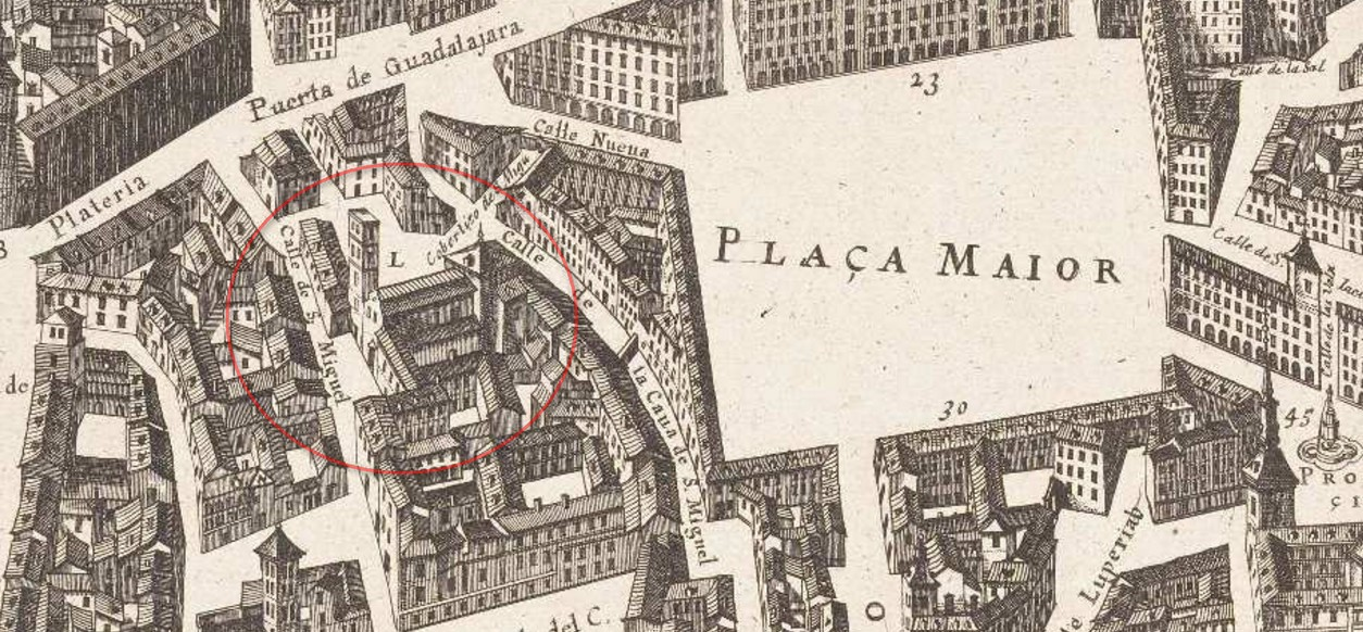 Detalle de la iglesia de San Miguel de los Octoes (L), junto a la Plaza Mayor, en un plano de Madrid del siglo XVII.